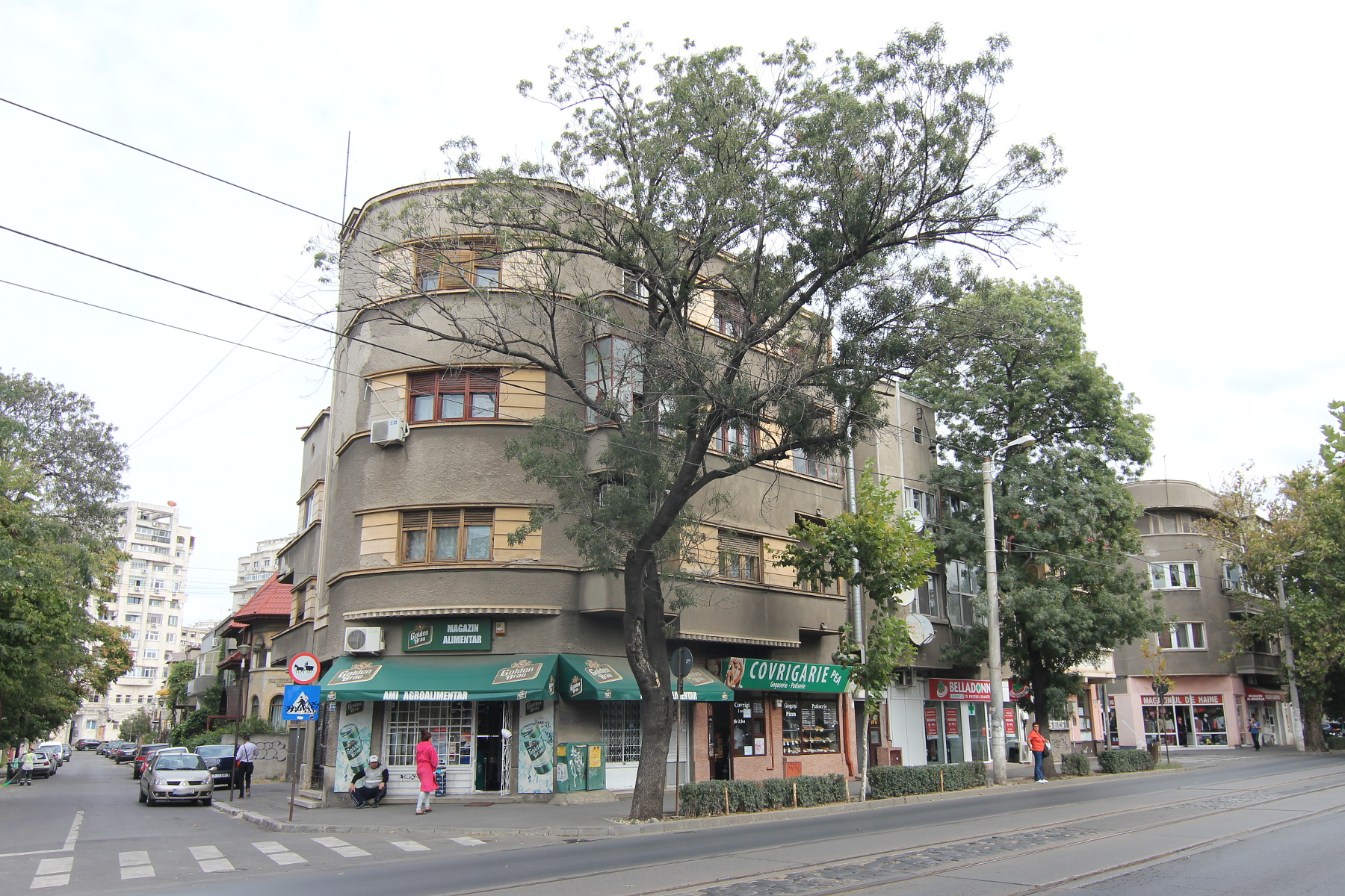 Casă pe Dudești